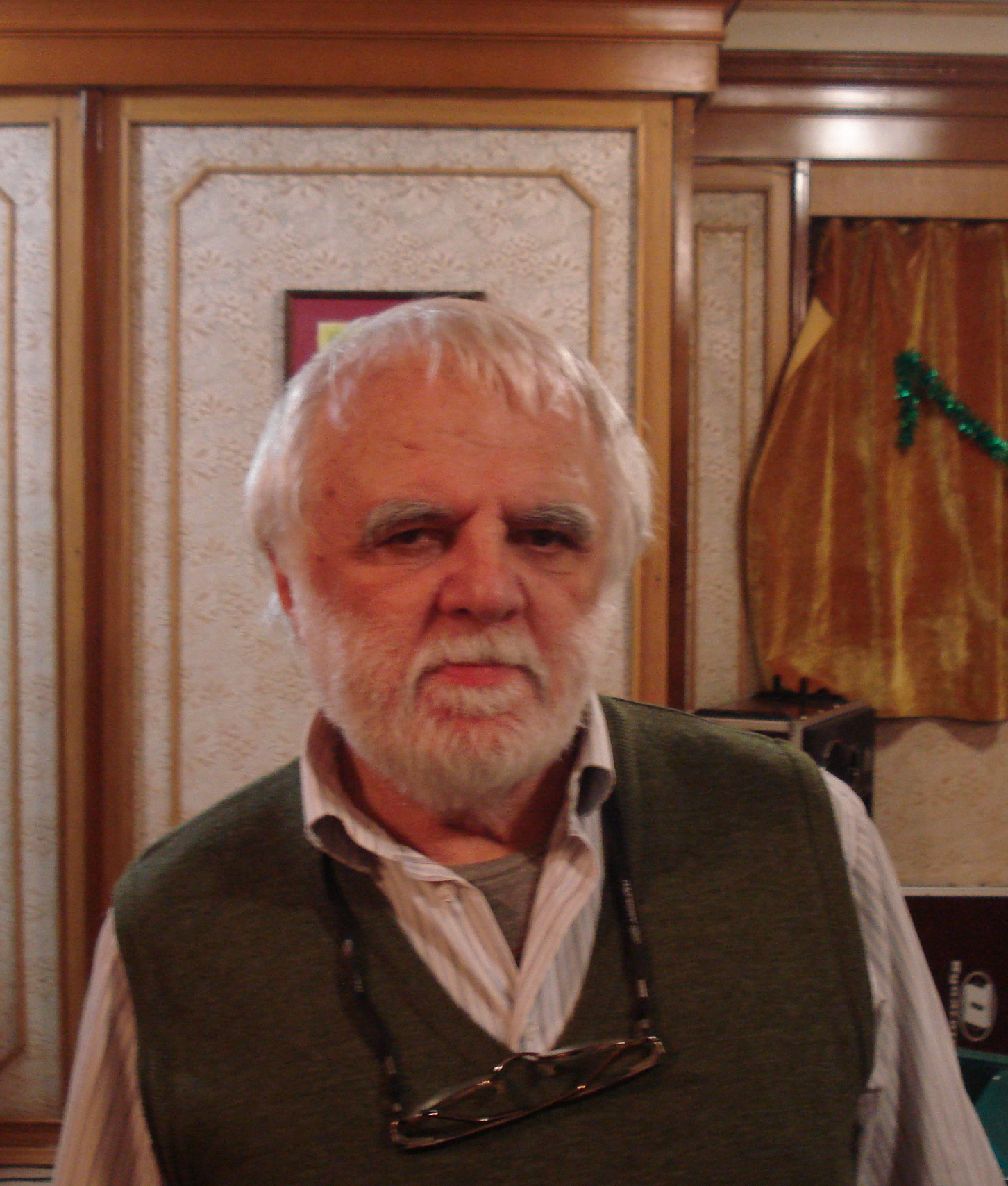 Парнис Александр Ефимович. Национальный литературный музей Украины, Киев, 18 января 2012 года.